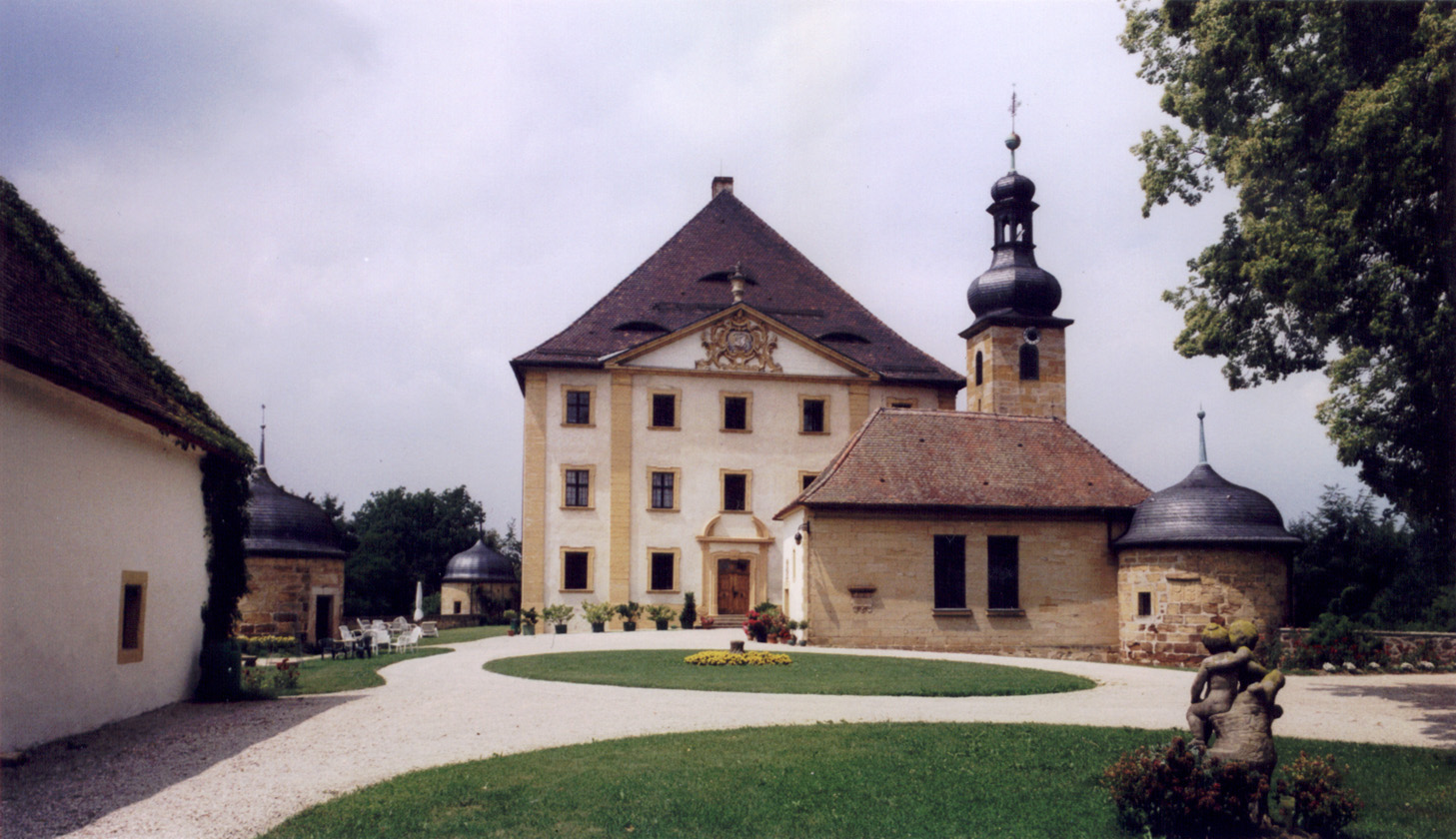 Schloss Trockau in Richtung Westen